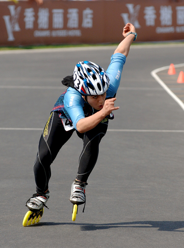 Inline Speedskating，速滑